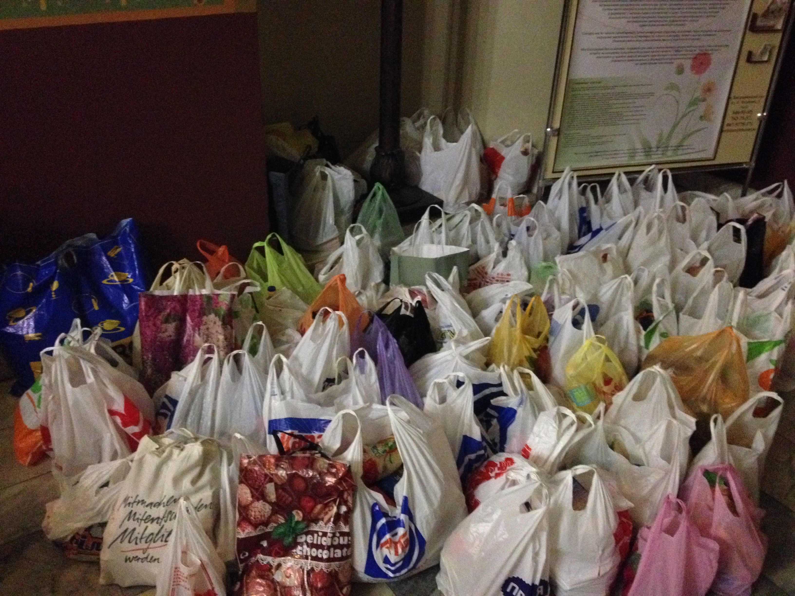 «Станція Харків»: збір продуктів у філармонії для допомоги ВПО